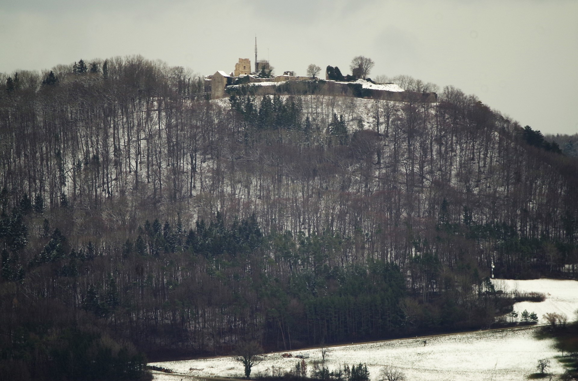 Küssaburg